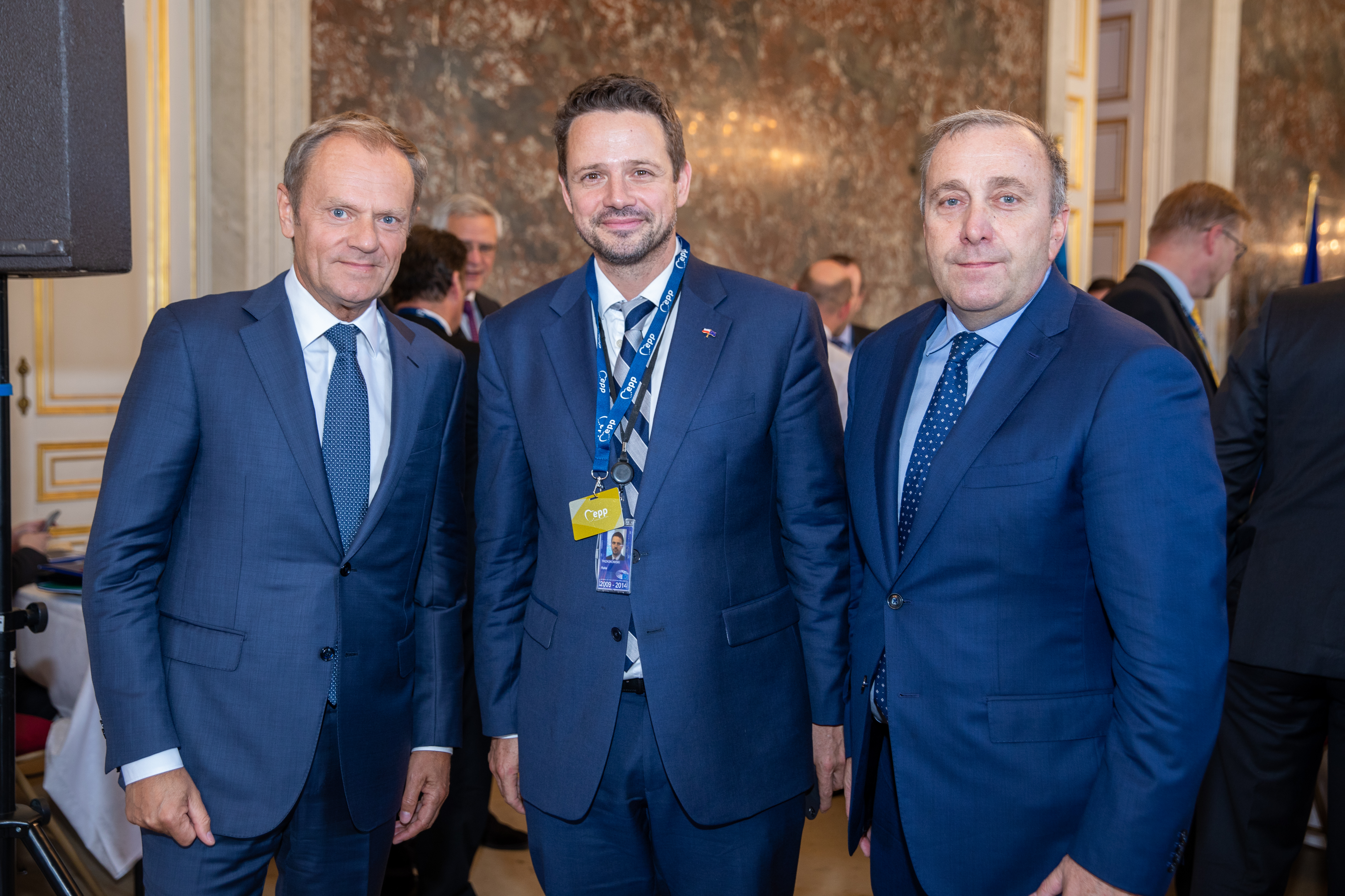 EPP Summit, Brussels, June 2018